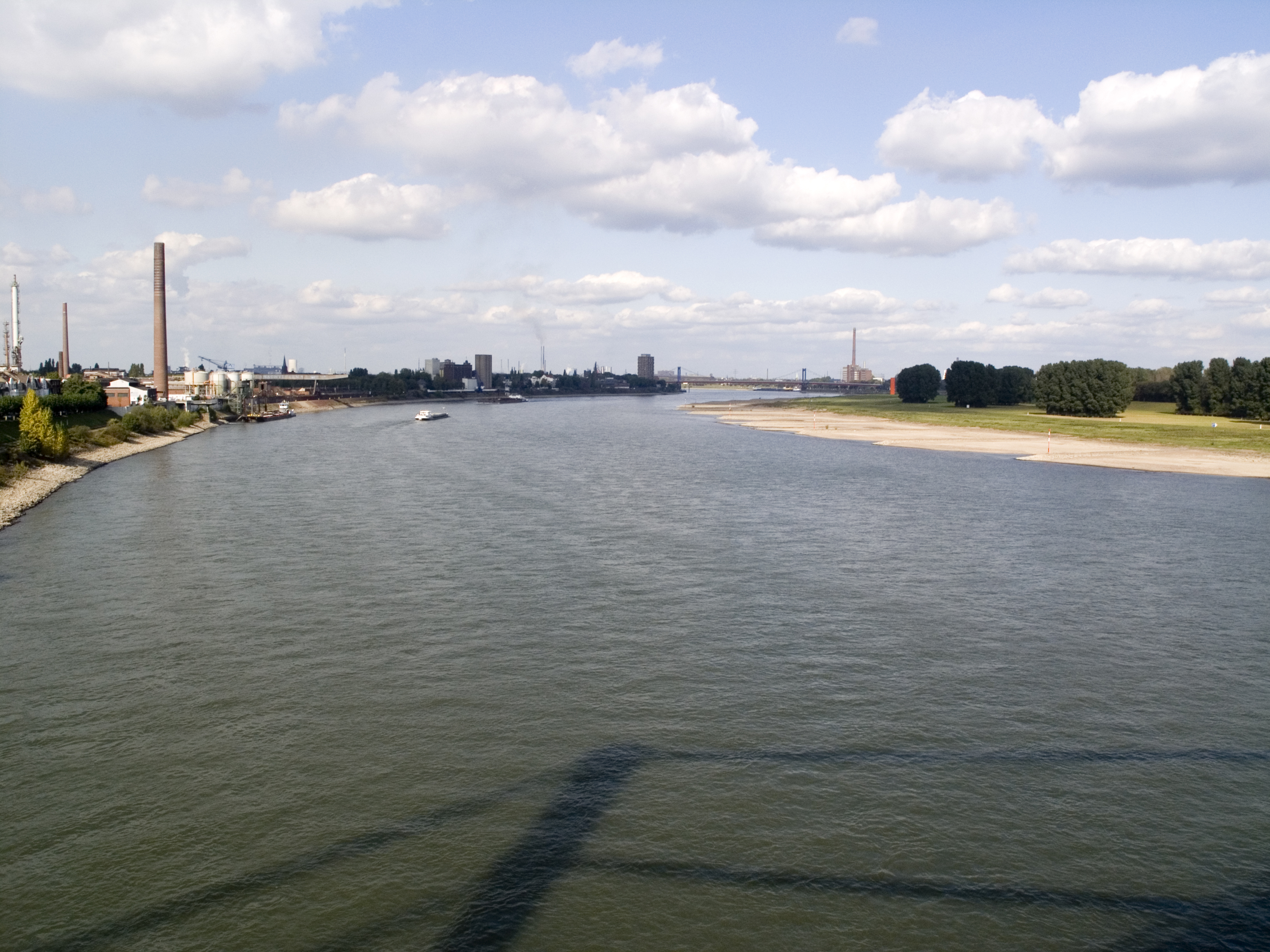 Северный Рейн - Вестфалия, Дуйсбург - мост Neuenkamp